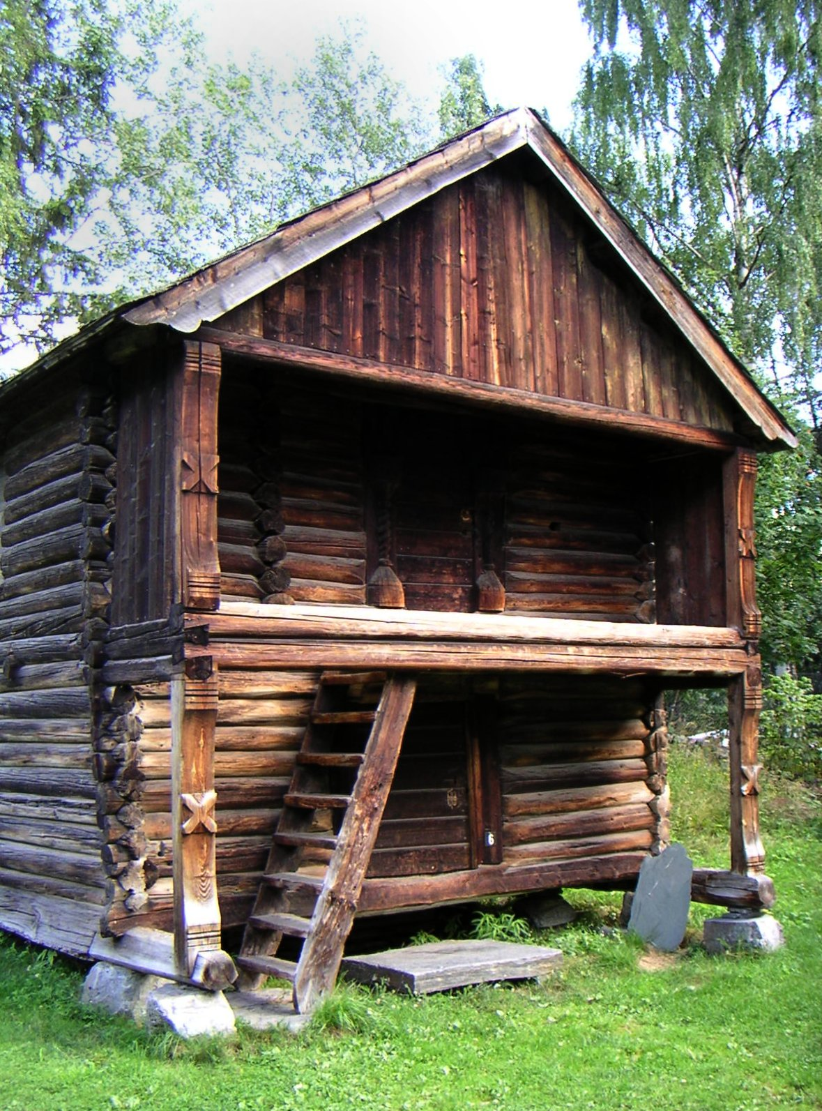 Hoveloftet